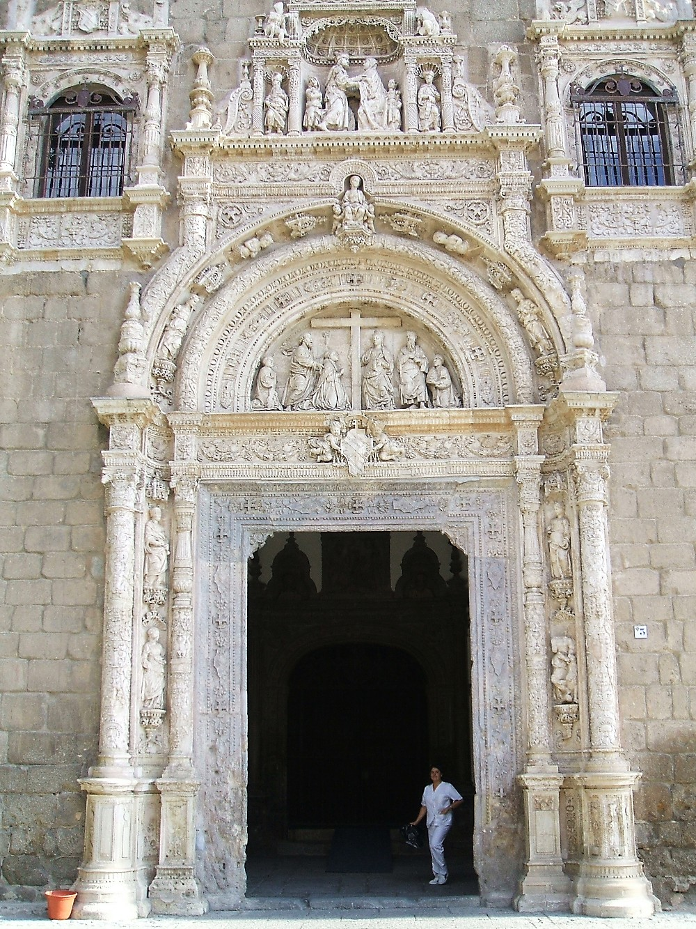 Hospital y Museo de Santa Cruz, Toledo